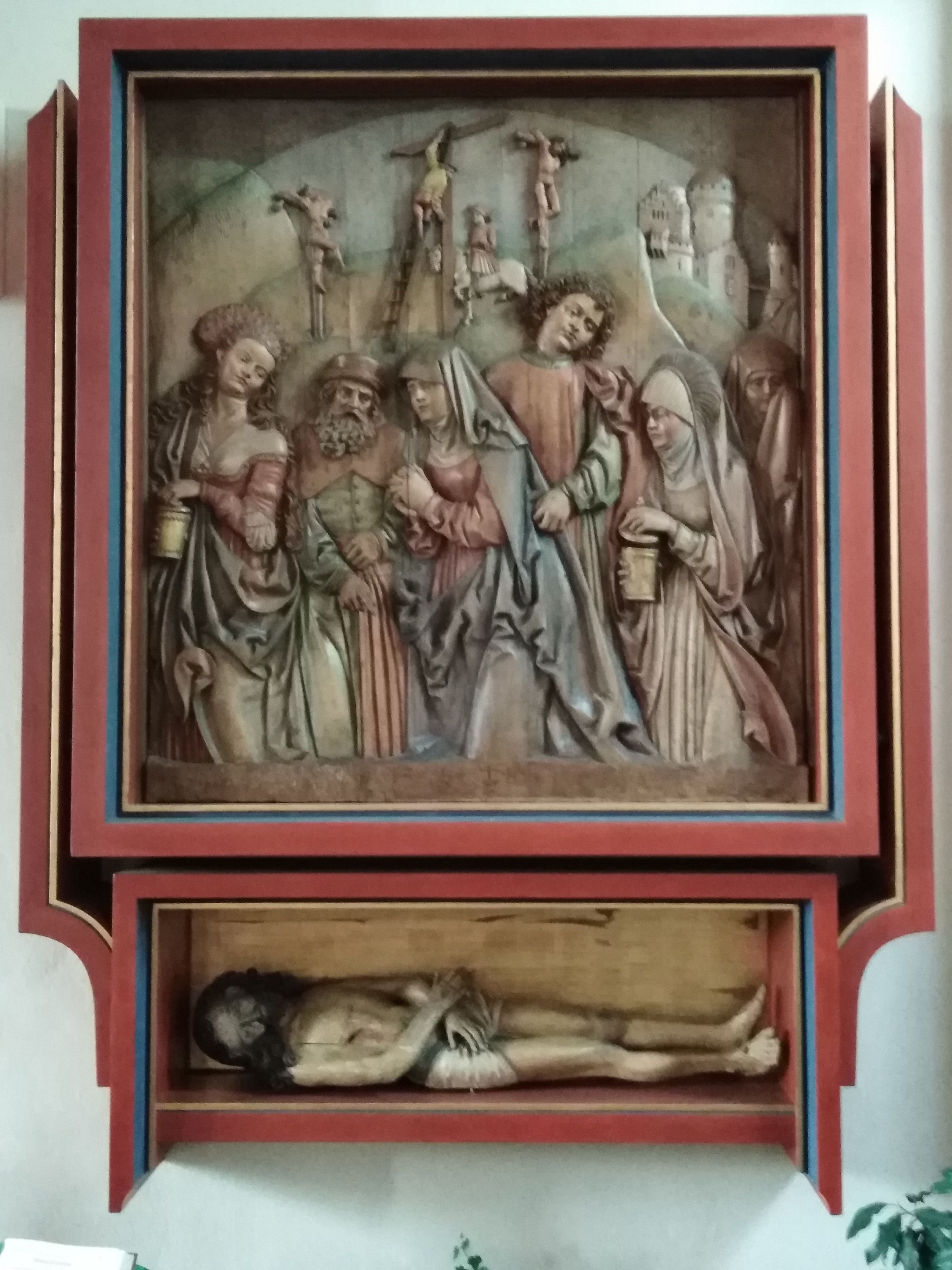 St. Gallus Villingendorf Darstellung des Heiligen Grabes. Flügelaltar der 1810 abgebrochenden Johanniterkirche